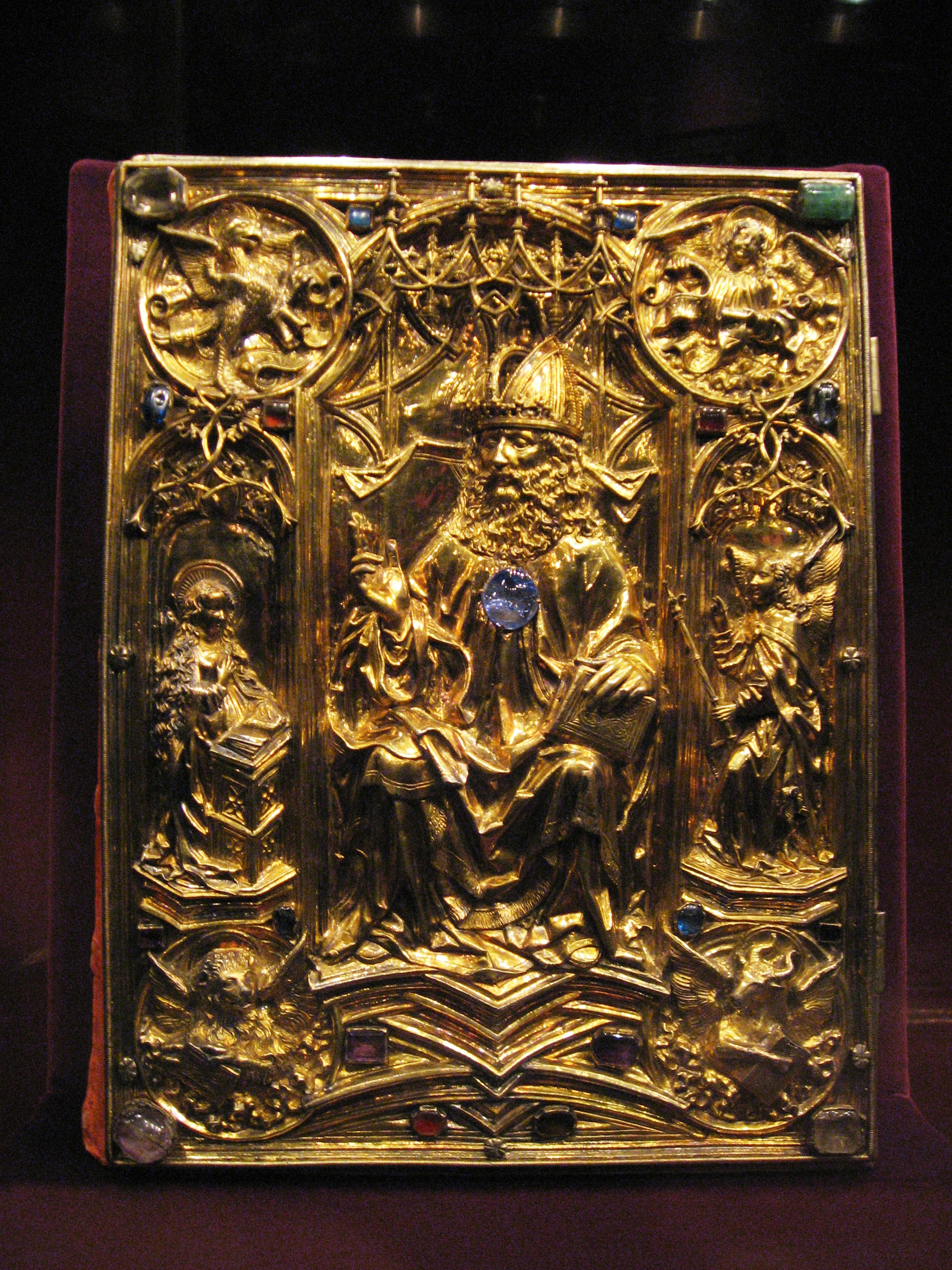 Krönungsevangeliar. Codex: Hof Karls des Großen. Aachen, gegen 800. Einband: Hans von Reutlingen, Aachen, um 1500. Purpurgefärbtes Pergament, goldene und silberne Tinte, Deckfarben. Einband: Silber vergoldet und Edelsteine. Inv. Nr. XIII 18.